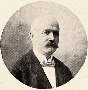 Friedrich Richard Adelbart Johow Biehler (también firmaba Federico Richard Adelbert) ( 1859 - 1933), fue un prestigioso botánico, micólogo, liquenólogo1 alemán,2 que trabajó cuarenta y cuatro años en Chile.